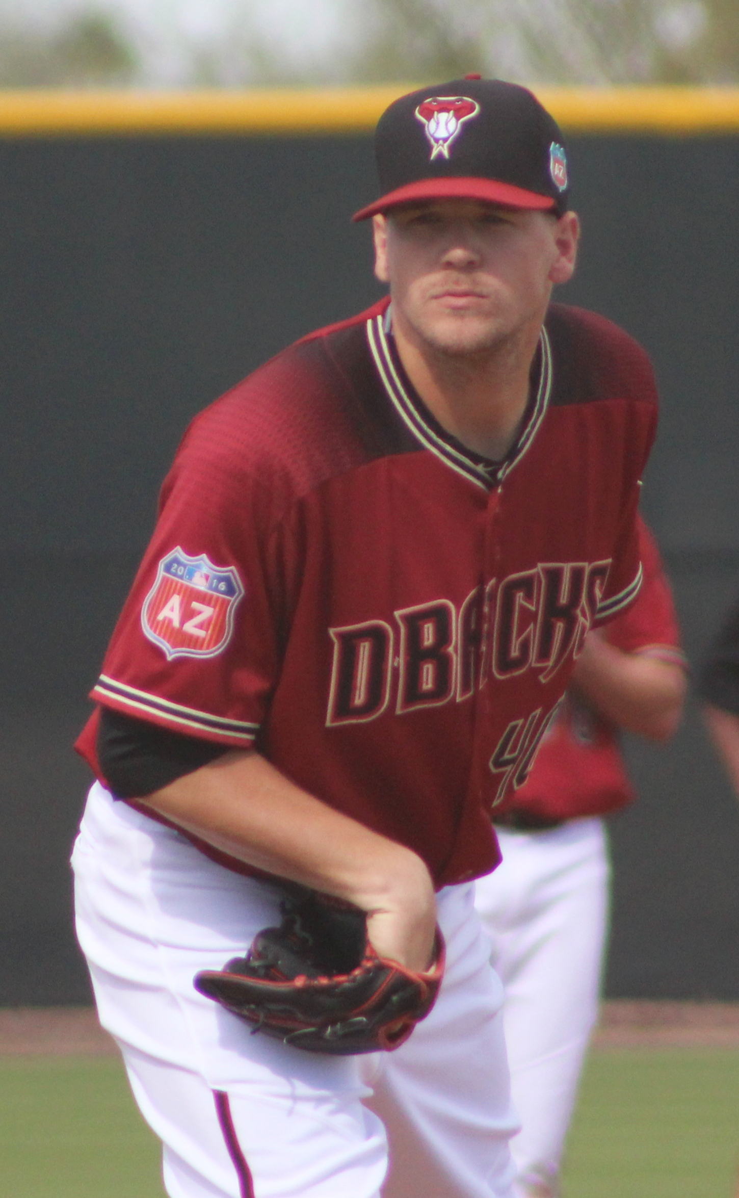 Andrew Chafin